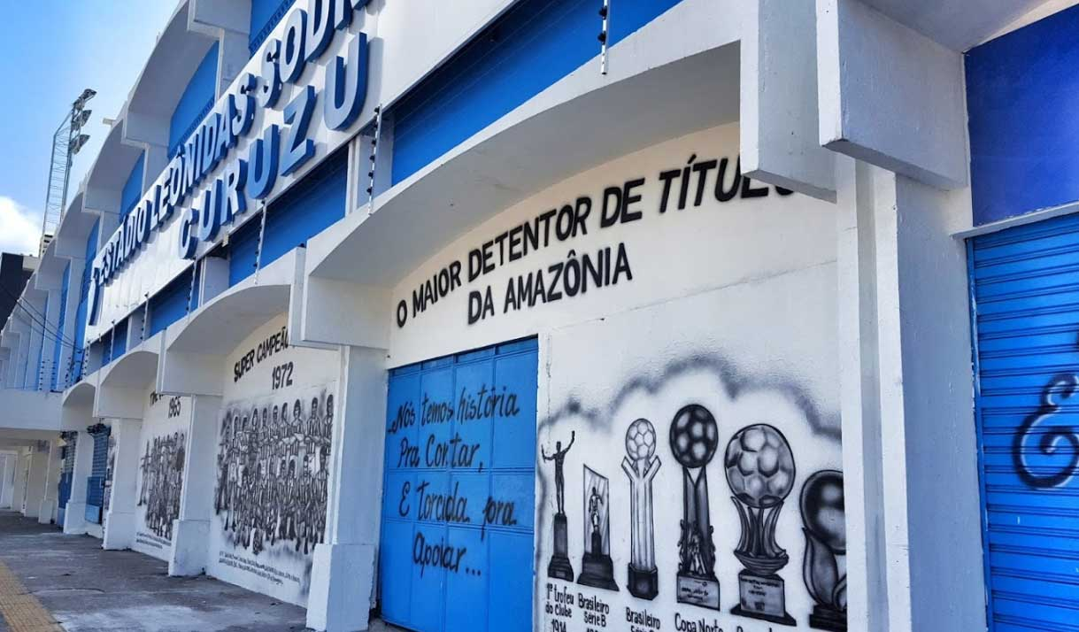 Frente do Estádio Leônidas Sondré de Castro. Foto Tirada em Dezembro de 2016